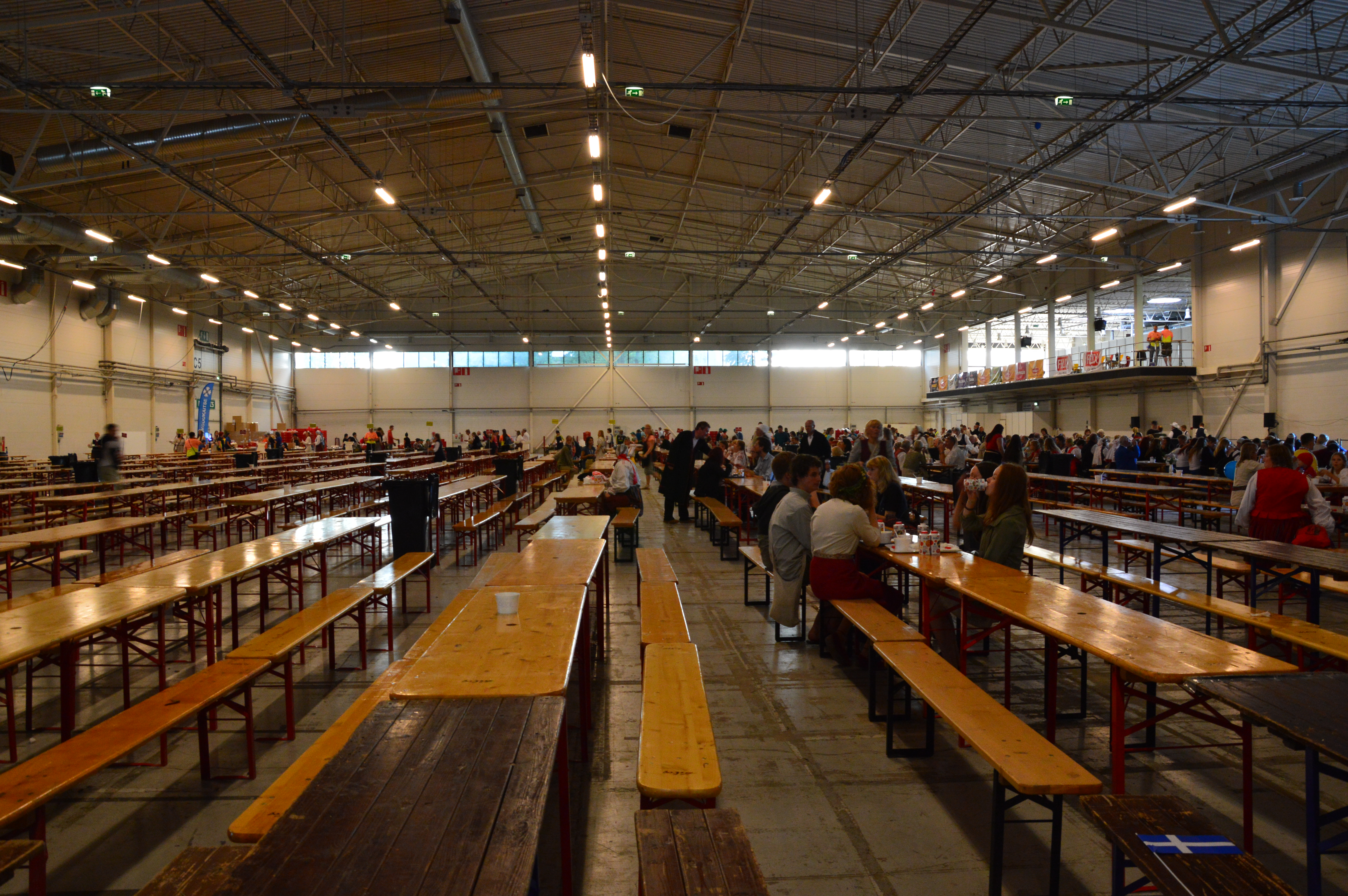 XXVI üldlaulupidu